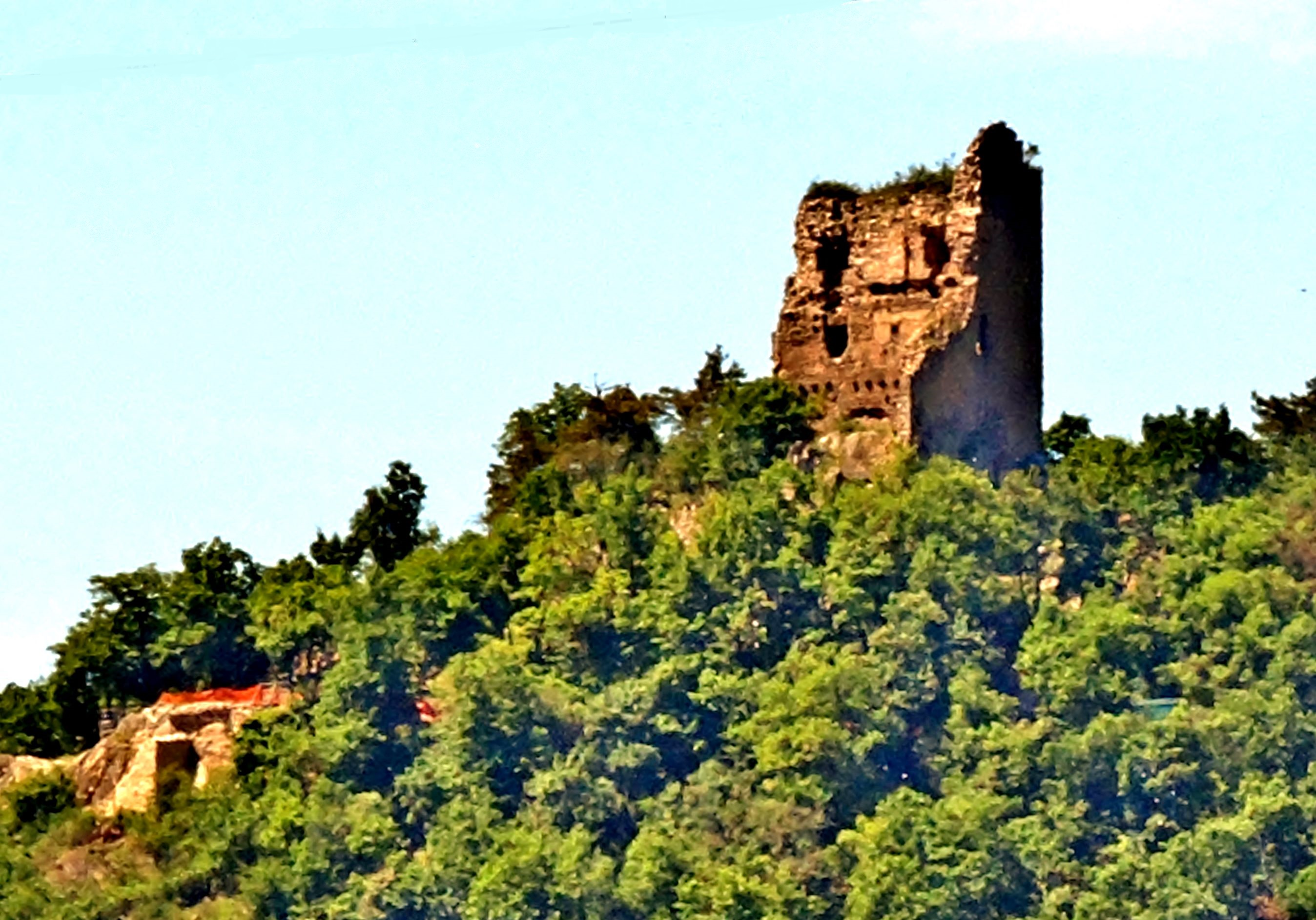 Ruines du château de Ramstein, vues du sentier de l'Ortenbourg. Scherwiller. Bas-Rhin